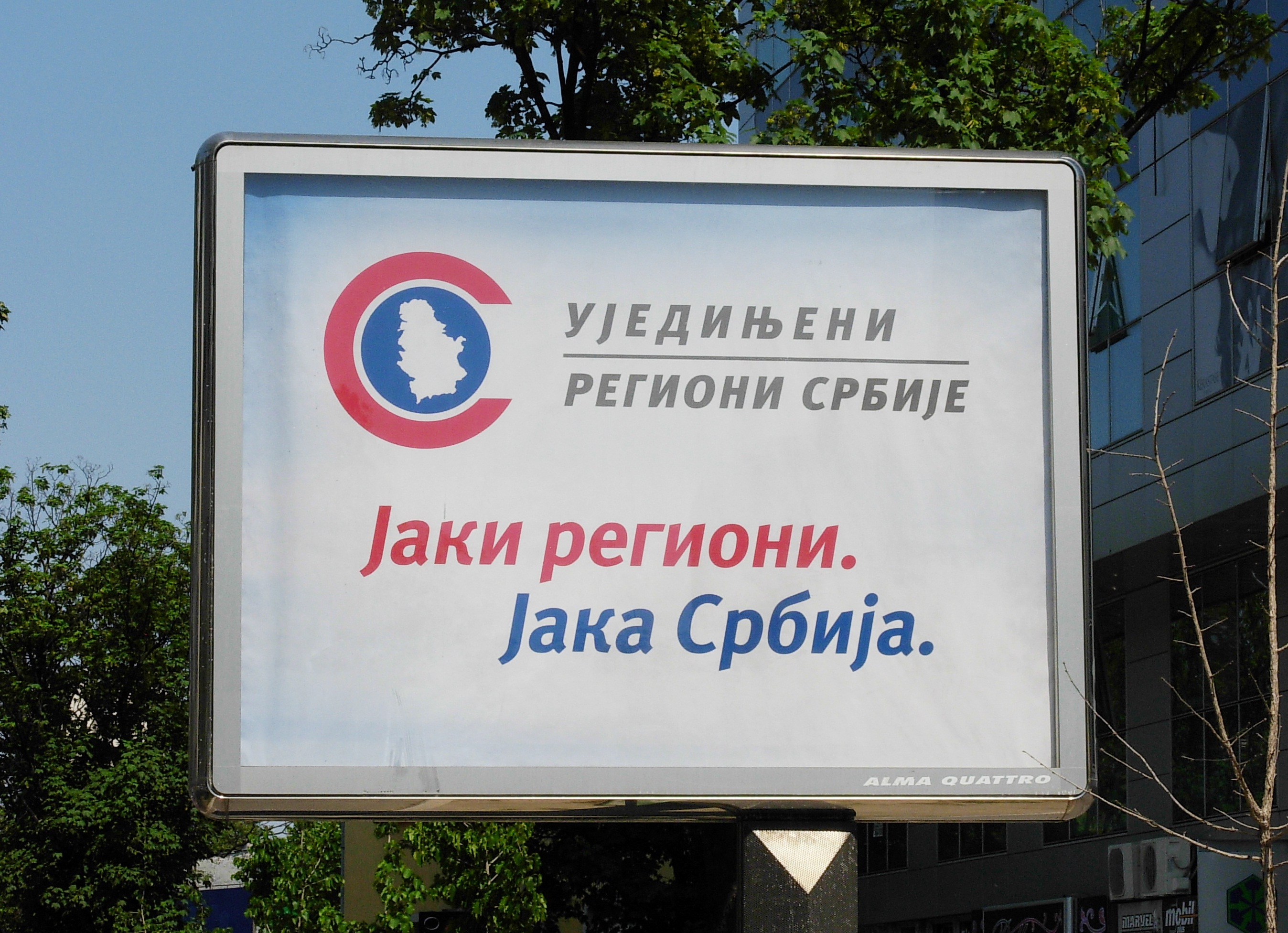 Bilbord - Ujedinjeni regioni Srbije, u Novom Sadu.